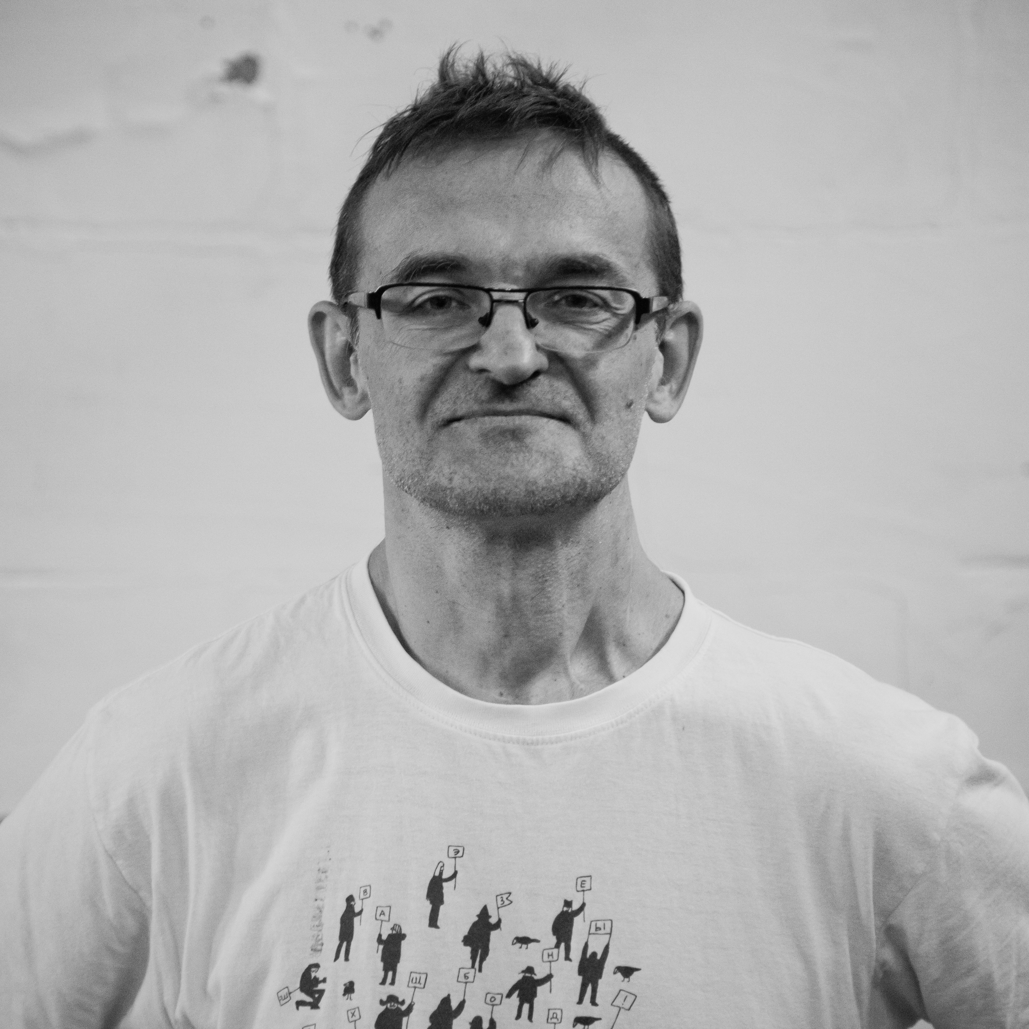 Художник Андрей Логвин